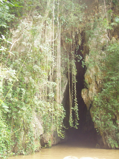 Liana. Cueva del Indio, Viñales, Cuba.